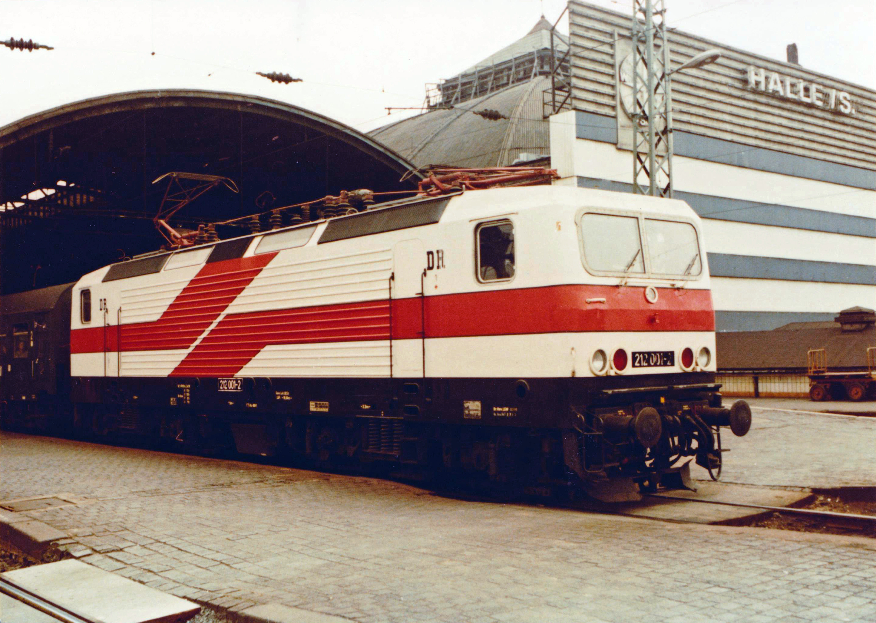 212 001 "Weiße Lady" am 02.09.1983 mit D 636 in Halle (Saale) Hbf. Im Hintergrund noch die alte Vorhangfassade. Fotoscan.